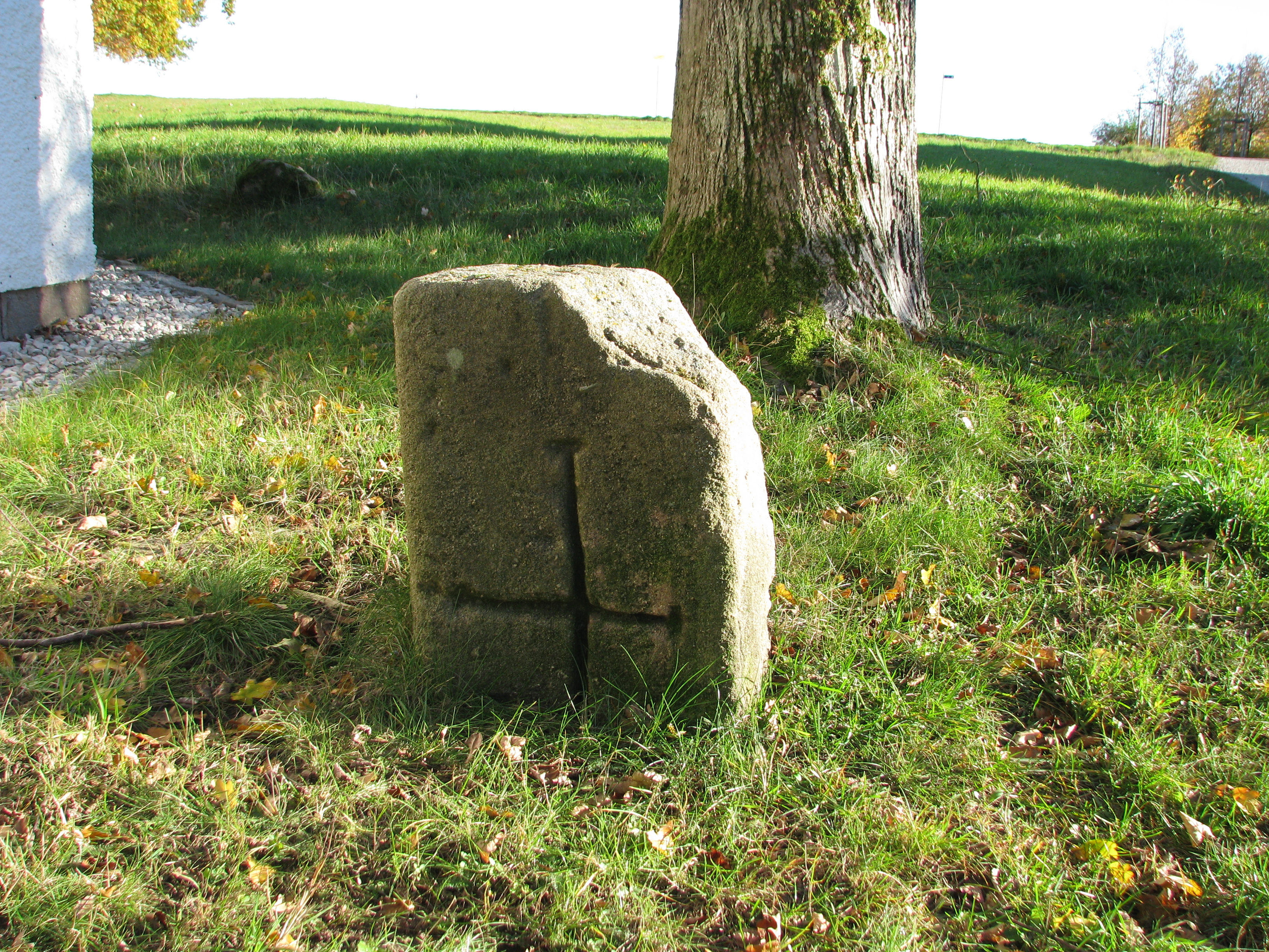 Marquardsholz, Ortsteil von Hilpoltstein im mittelfränkischen Landkreis Roth, Kreuzstein bei der Götzkapelle